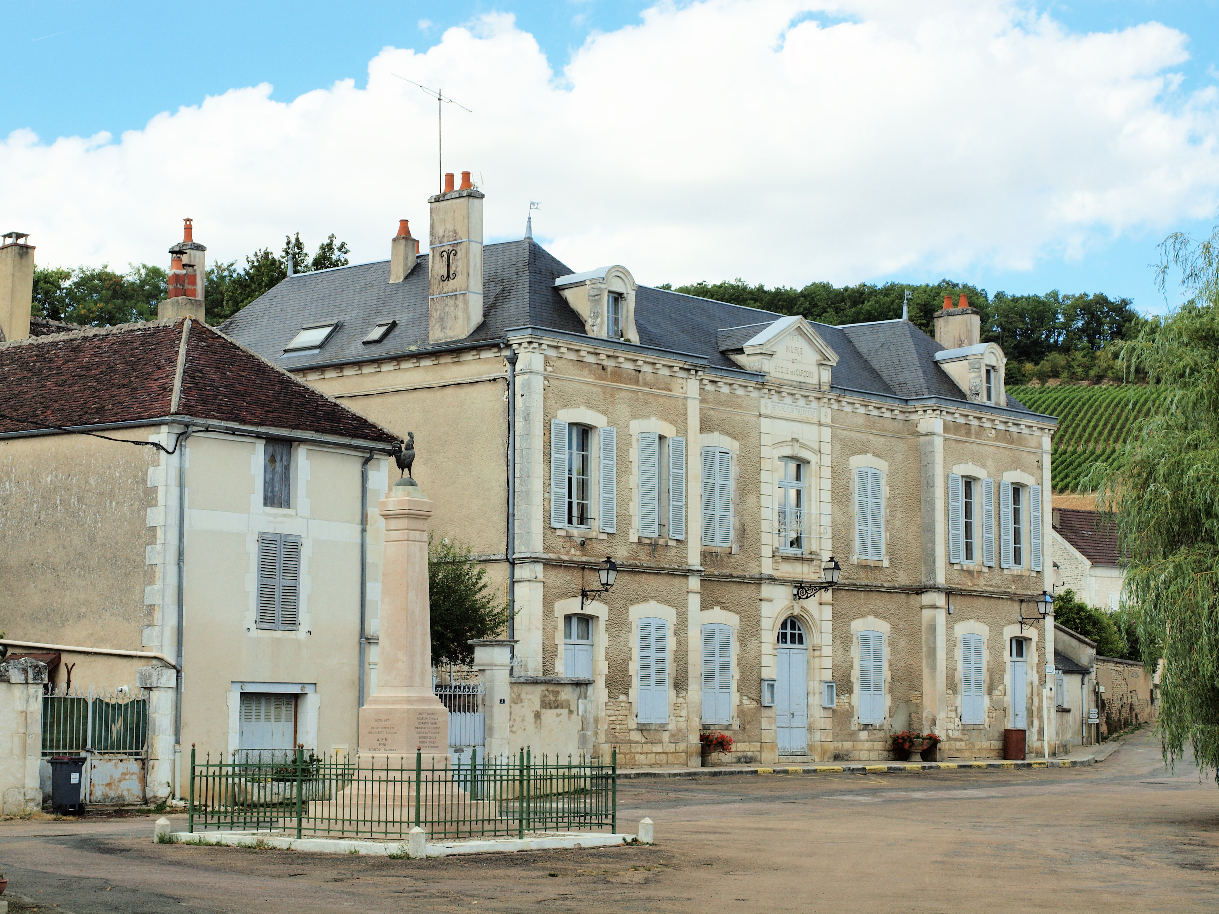 Mairie de Migé (Yonne, France)